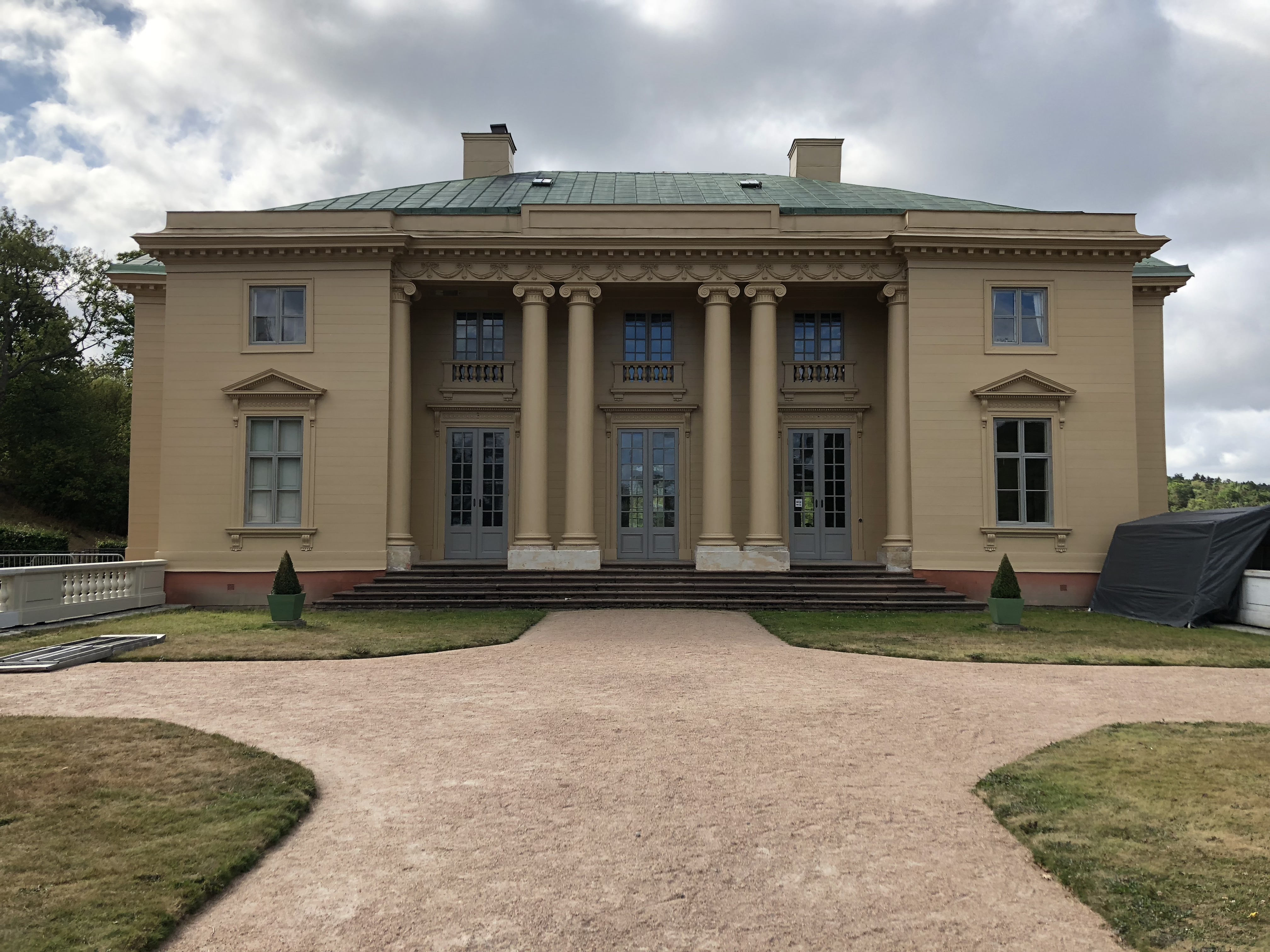 Gunnebo slotts huvudfasad